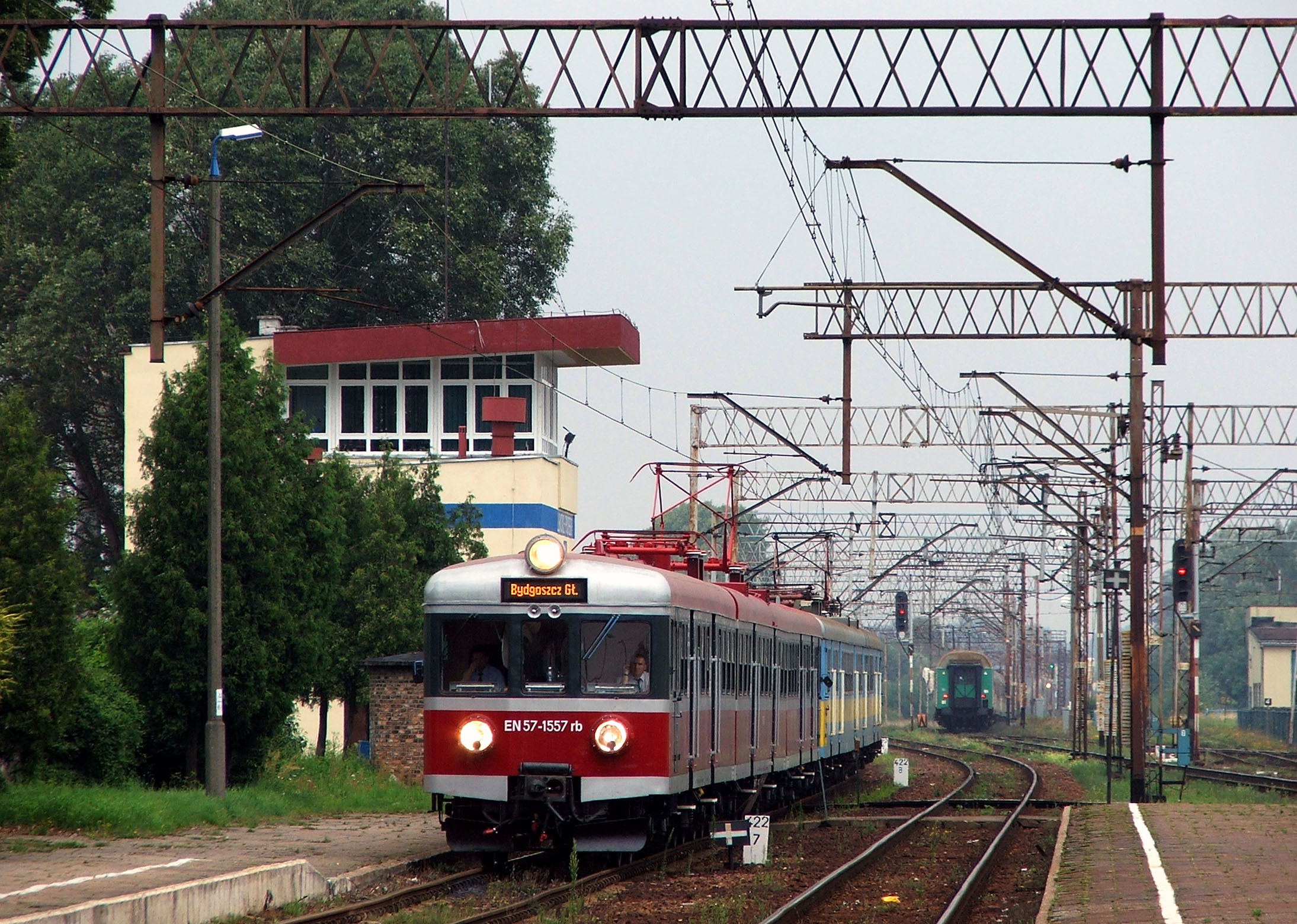 Stacja Laskowice Pom. EN57-1557 jako os. Gdańsk Gł. - Bydgoszcz Gł.